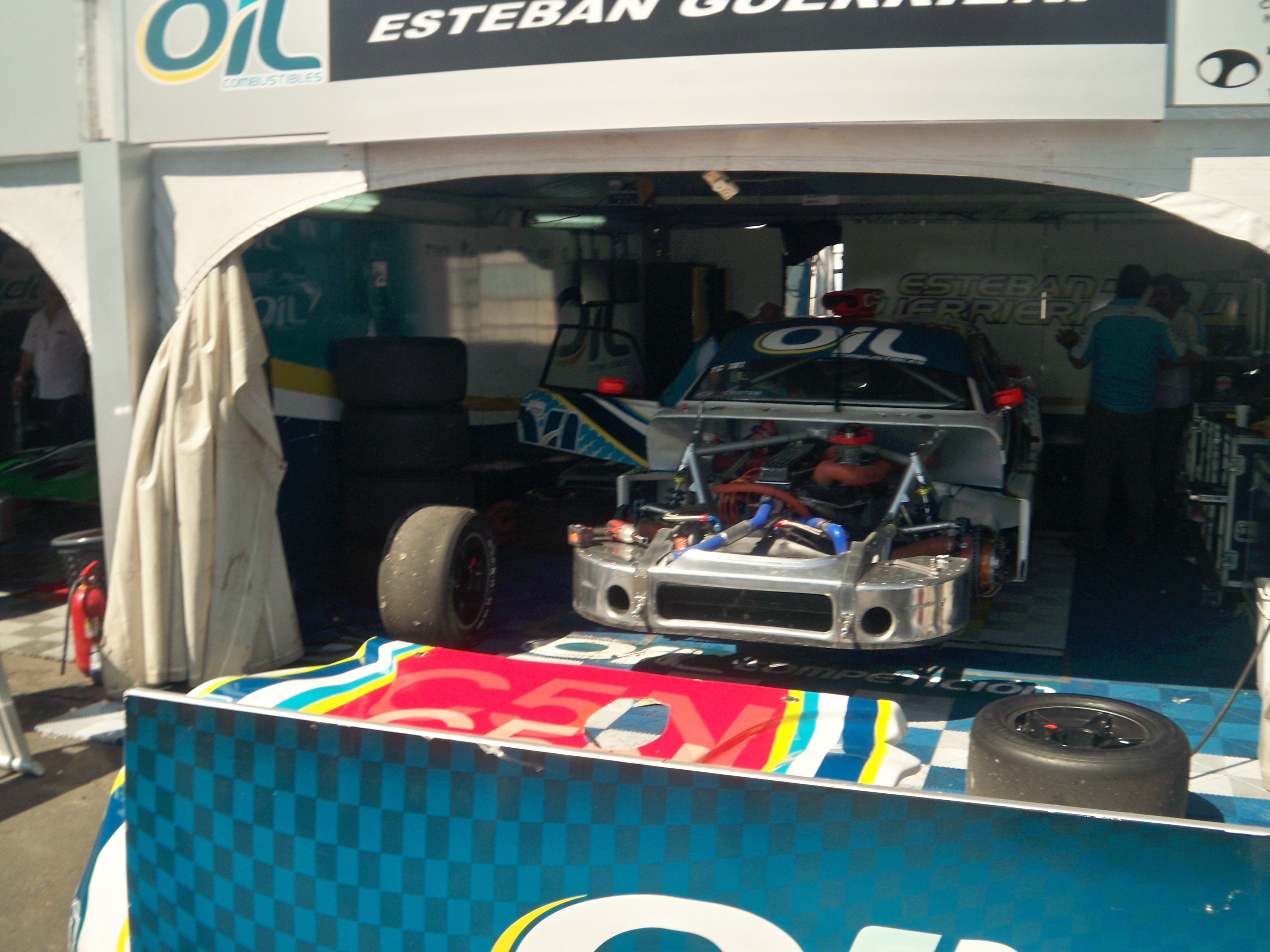 Dodge de Esteban Guerrieri en el box del Oil Competición, en Paraná 2013.